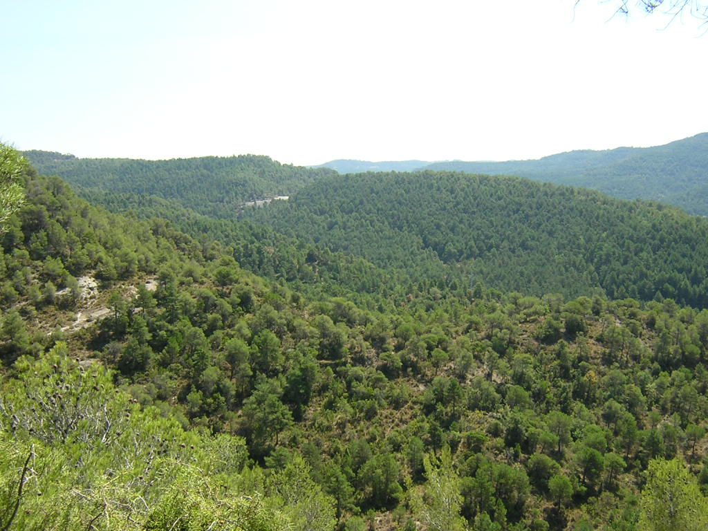 El Coll de Sant Llogari i la Carena de la Baga (Monistrol de Calders, Moianès)